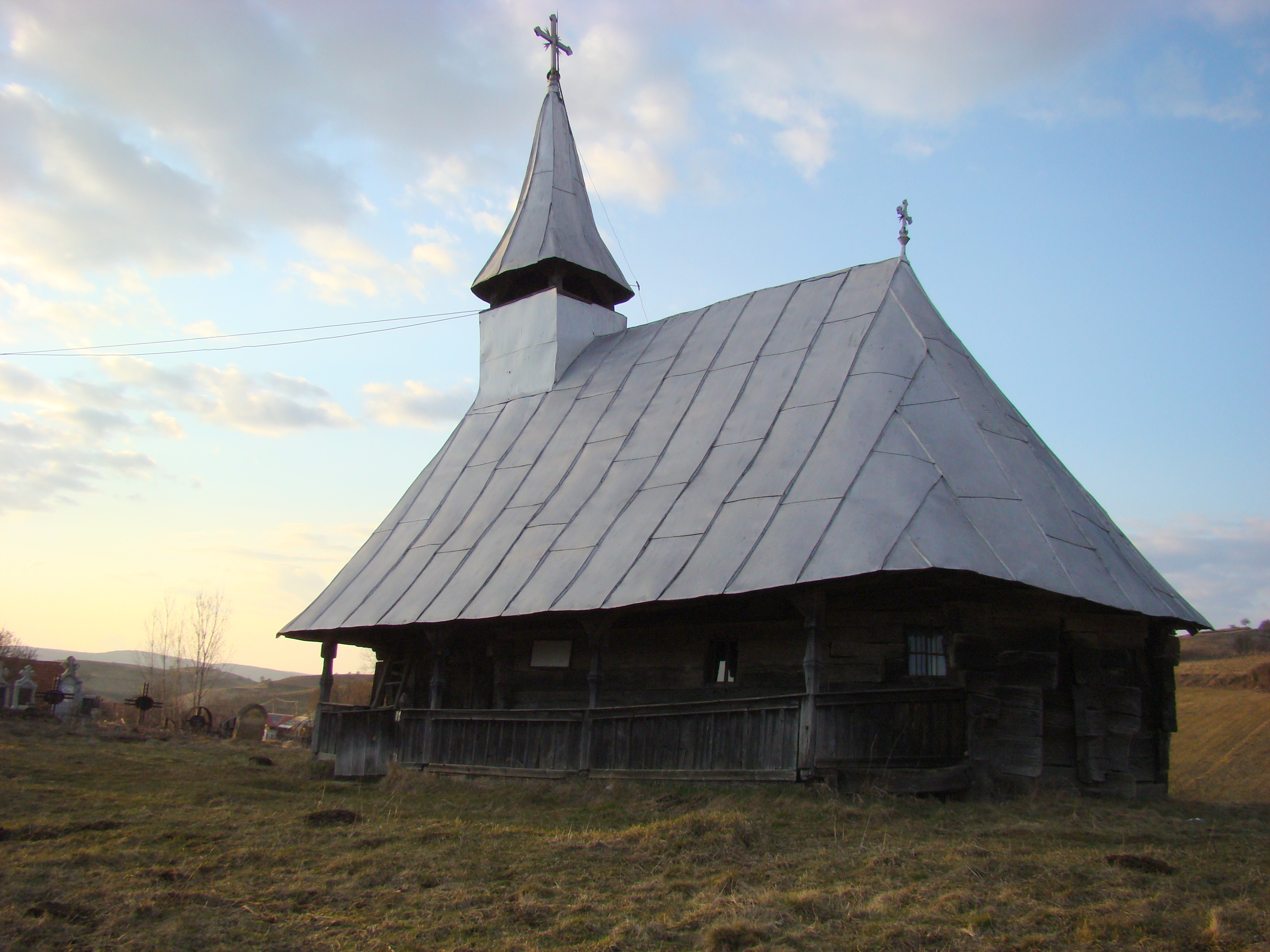 Biserica de lemn din Sumurducu